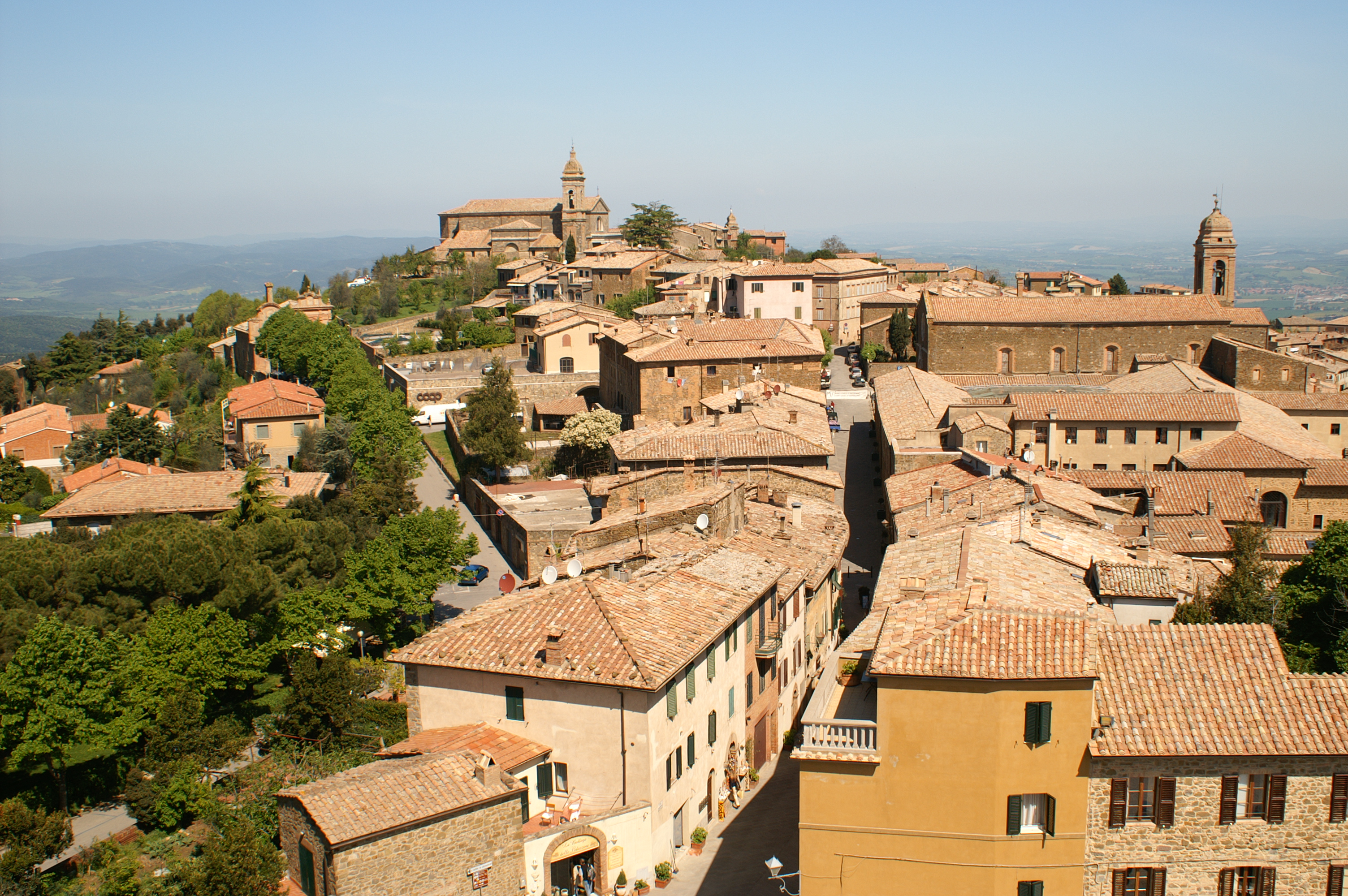 Blick auf Montalcino von der Festung am Stadtrand